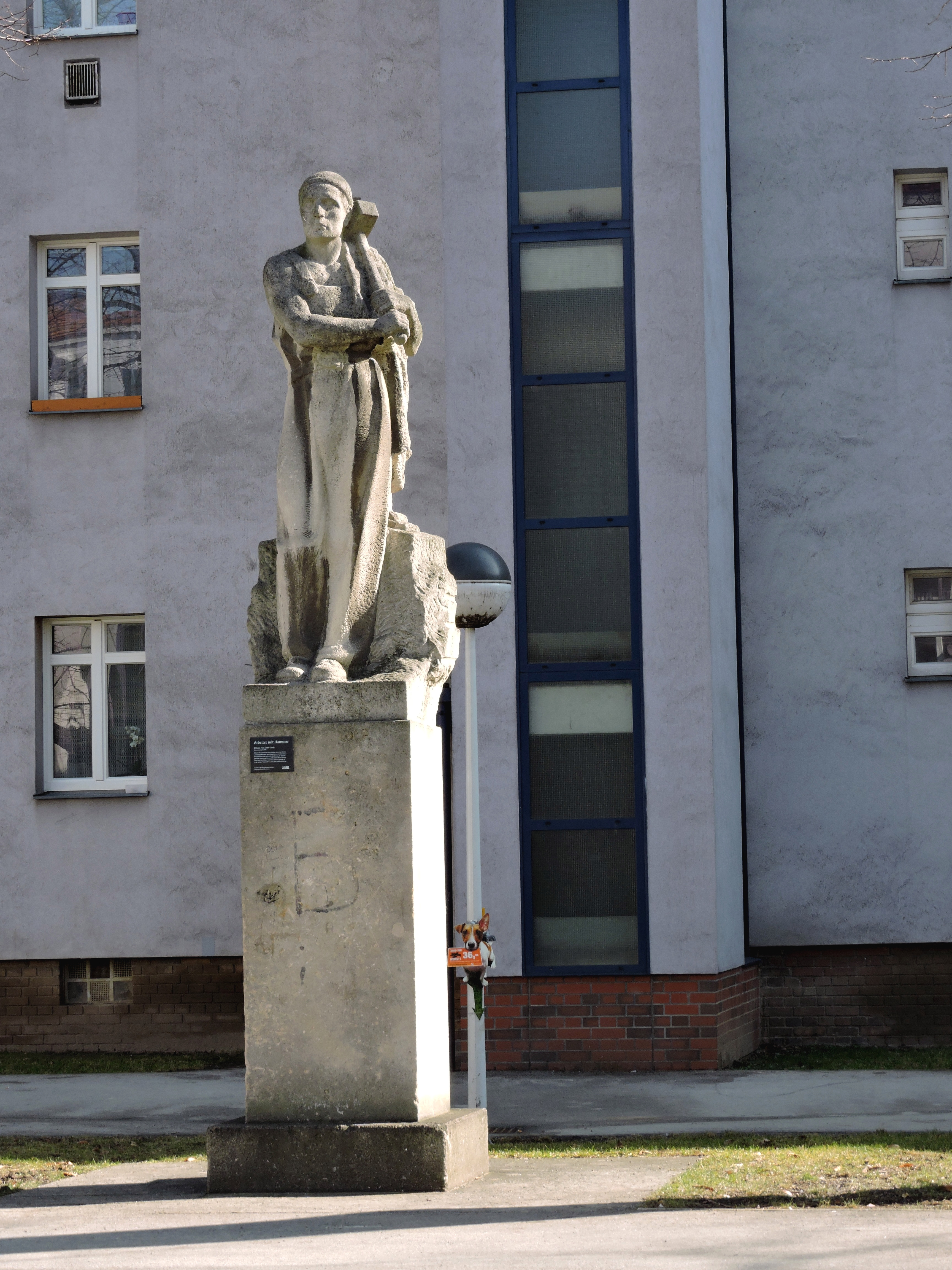 Plastik "Arbeiter mit Hammer"